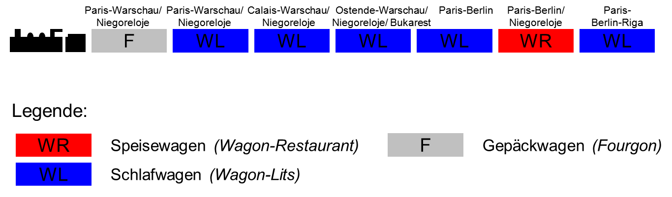 Zugbildung des Nord-Express zwischen Hannover und Berlin, Winterfahrplan 1938/39, eigene Darstellung nach: Albert Mühl: Internationale Luxuszüge, EK-Verlag, Freiburg im Breisgau 1991